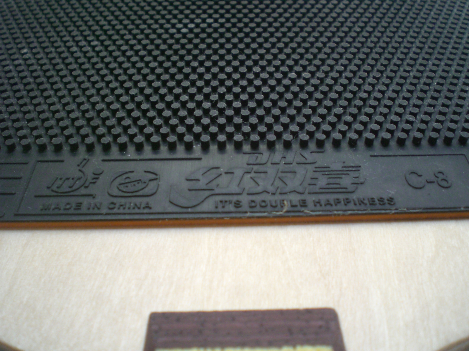 紅雙喜牌子桌球拍, 中國製造中國馳名商標